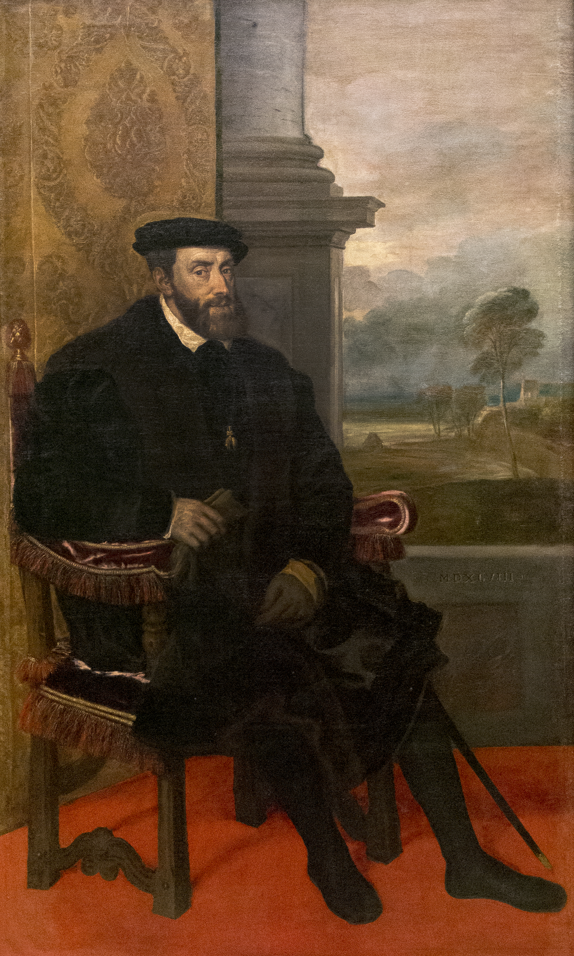 Titiaan (ca.1487–1576) Keizer Karel V - Alte Pinakothek